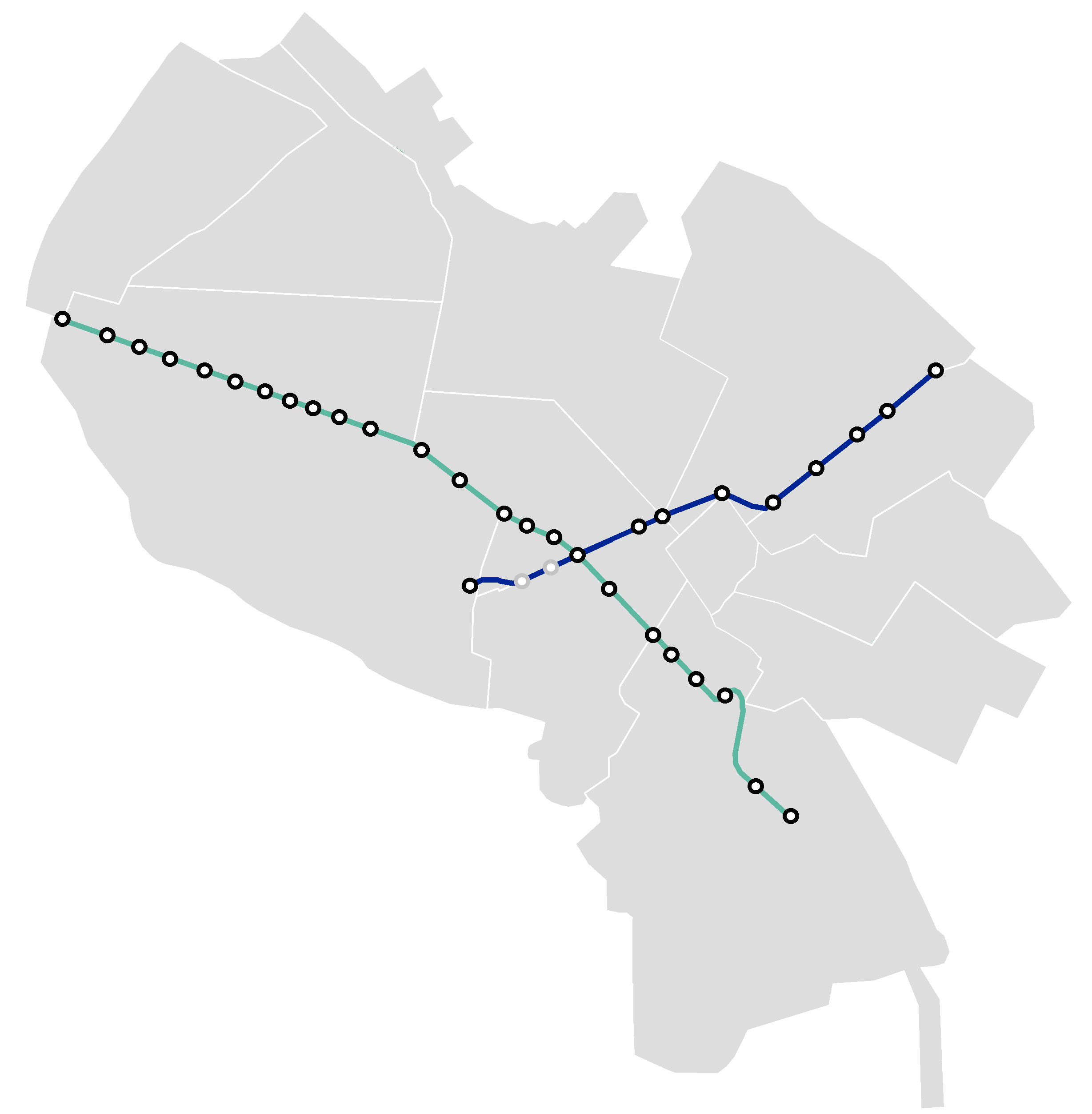 نقشه خطوط مترو شهر مشهد